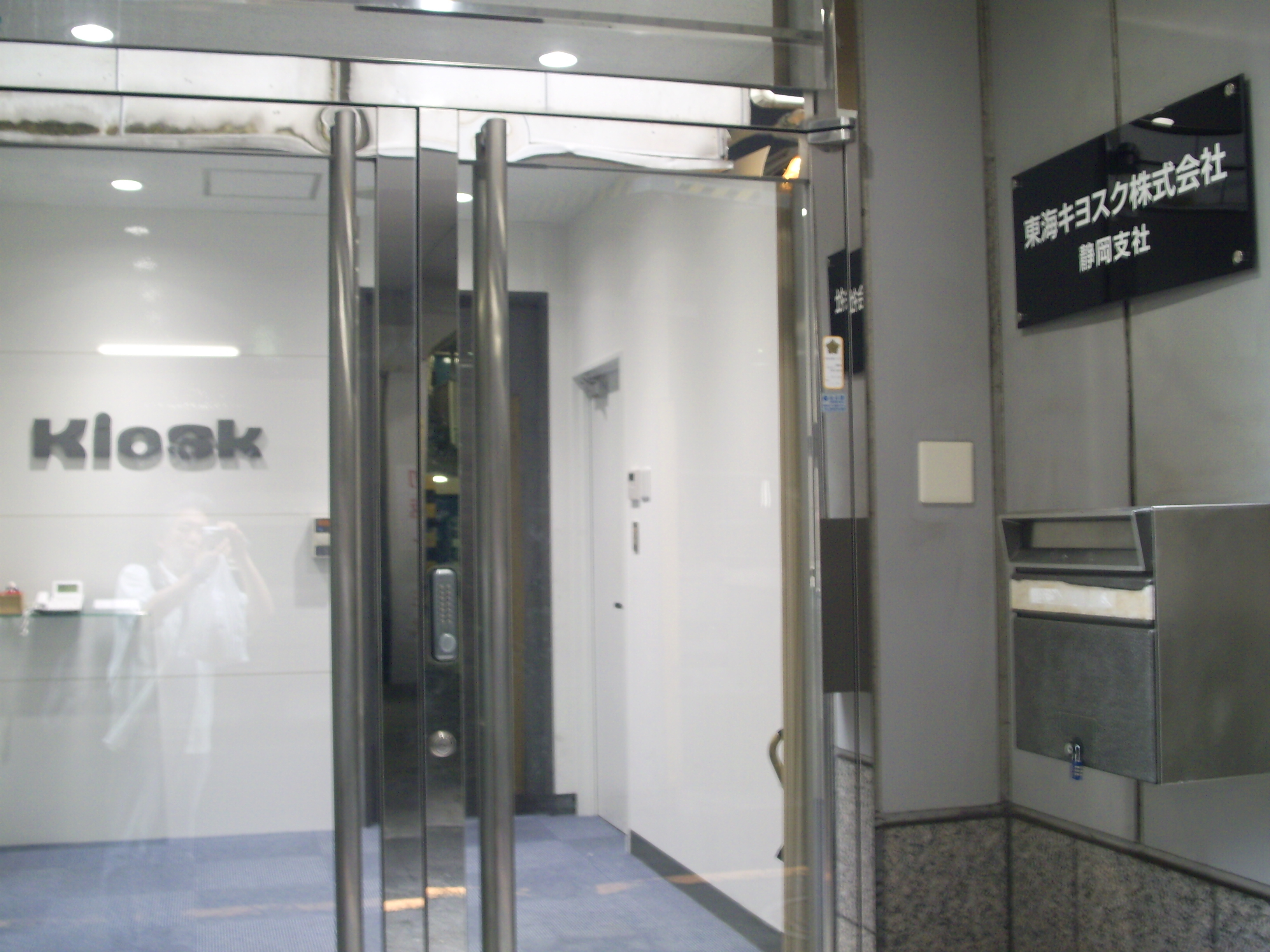 JR東海静岡運輸区ビルに入居する東海キヨスク静岡支社 Caution:Sorry！Built-in clock error!!